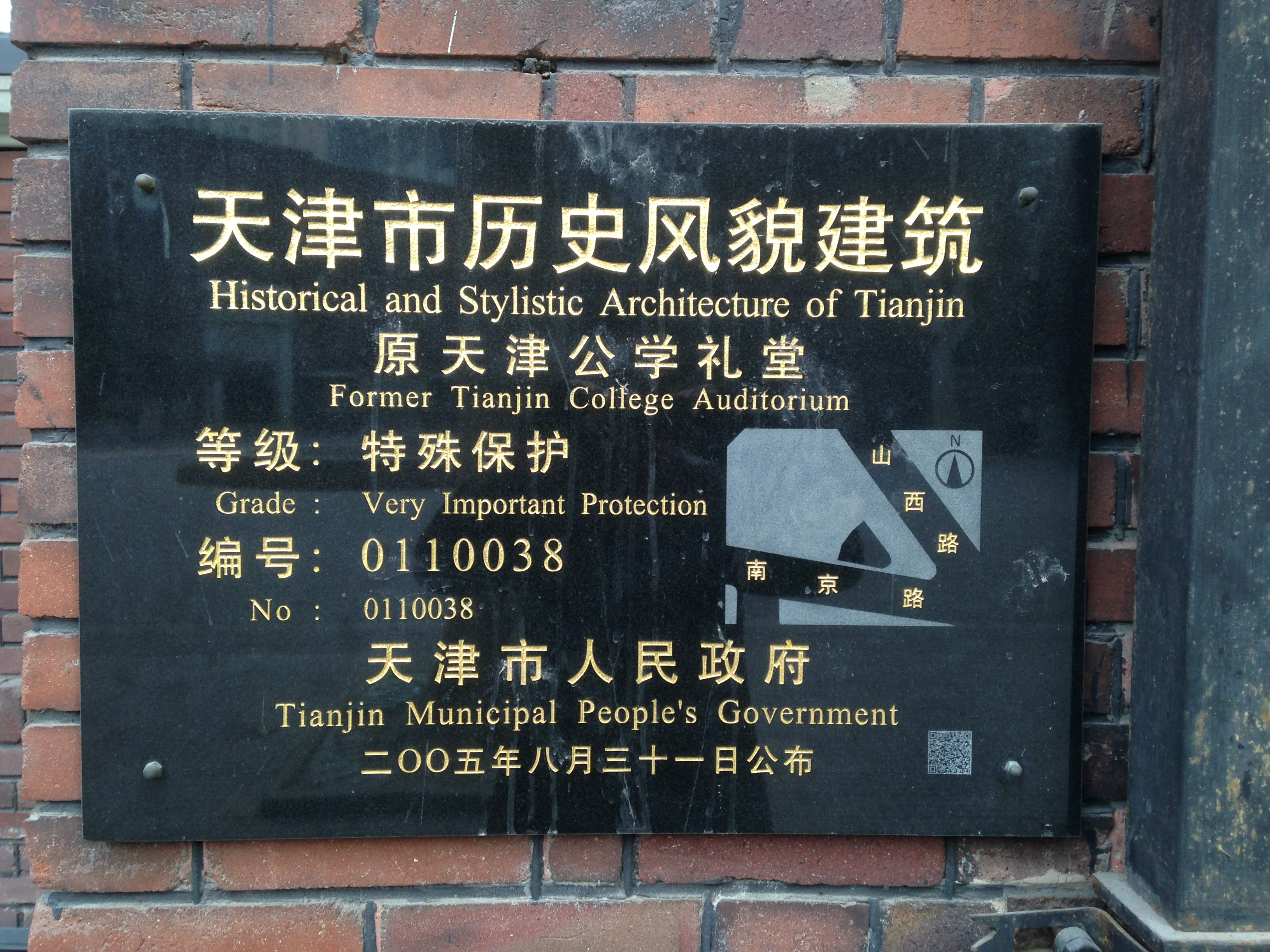 耀华中学礼堂铭牌